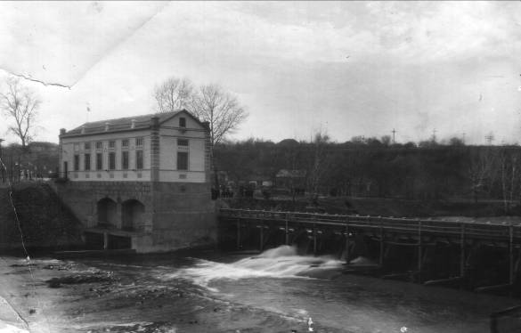 1954 рік. ГЕС працює